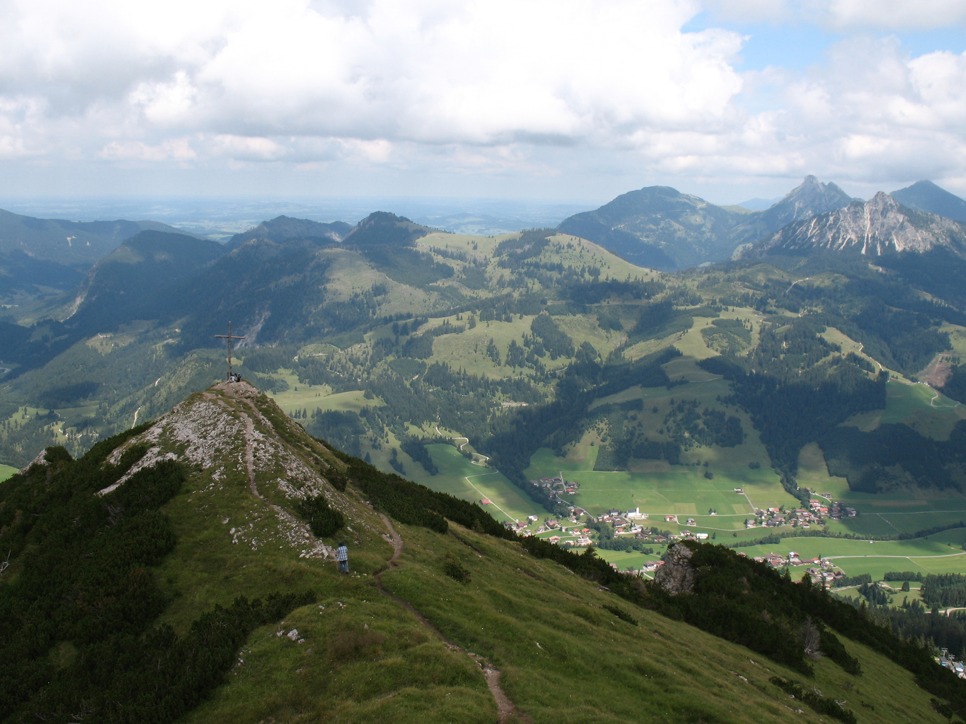 Blick auf die Kühgundspitze (1852 m) über dem Tannheimer Tal, im Hintergrund die Tannheimer Berge.